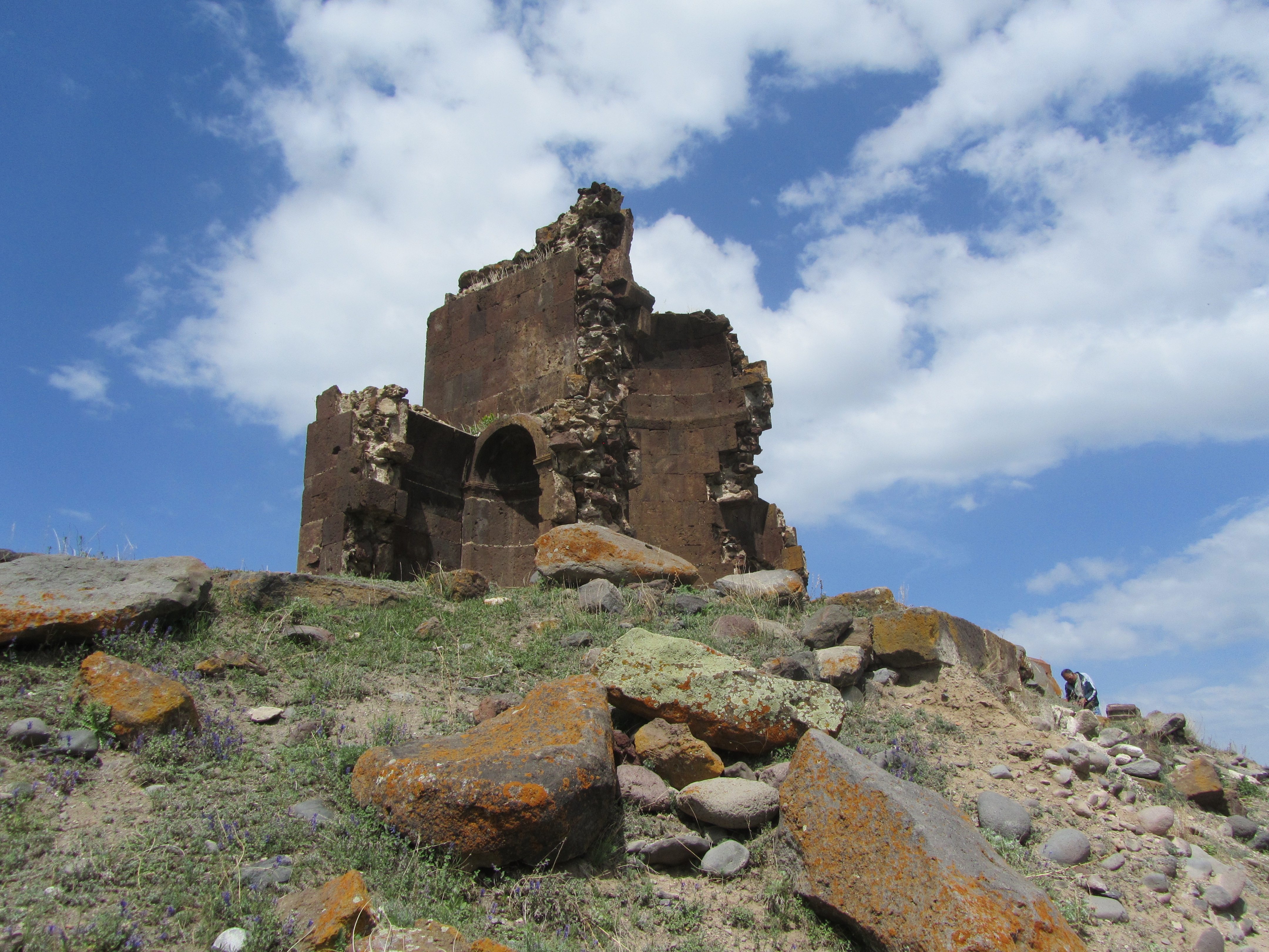 Վանական համալիր «Շողագավանք» Photo by Arthur Papoyan 60/22